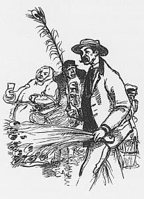 Marchand de plumes de paon des rues de Paris. On en vendait au moment du Carnaval. Leur vente fut interdite par la Préfecture de police.